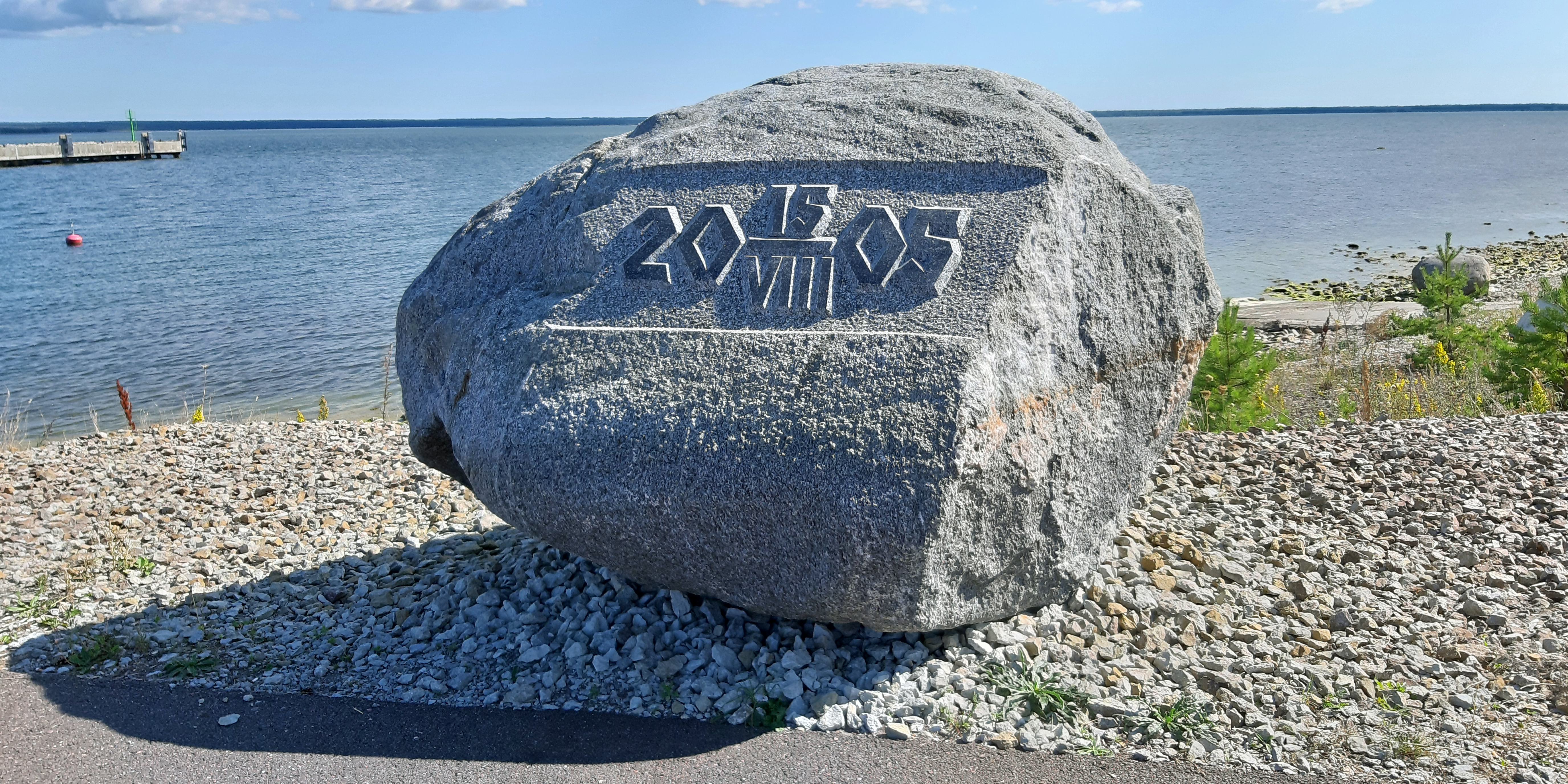 Краеугольный камень порта Сааремаа. Заложен 15 августа 2005 года.